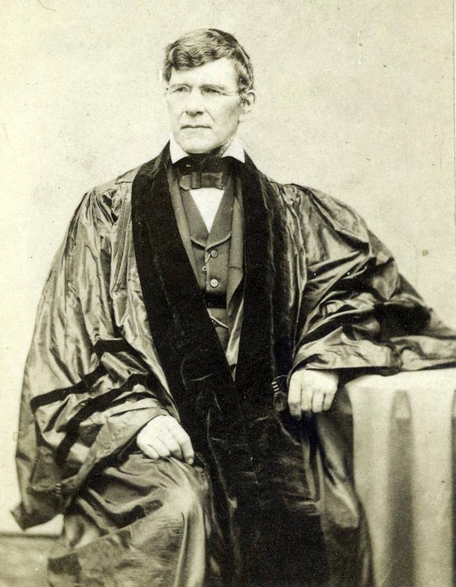 George Allen (1808-1876), LL.D. (hon.) 1868, portrait photograph